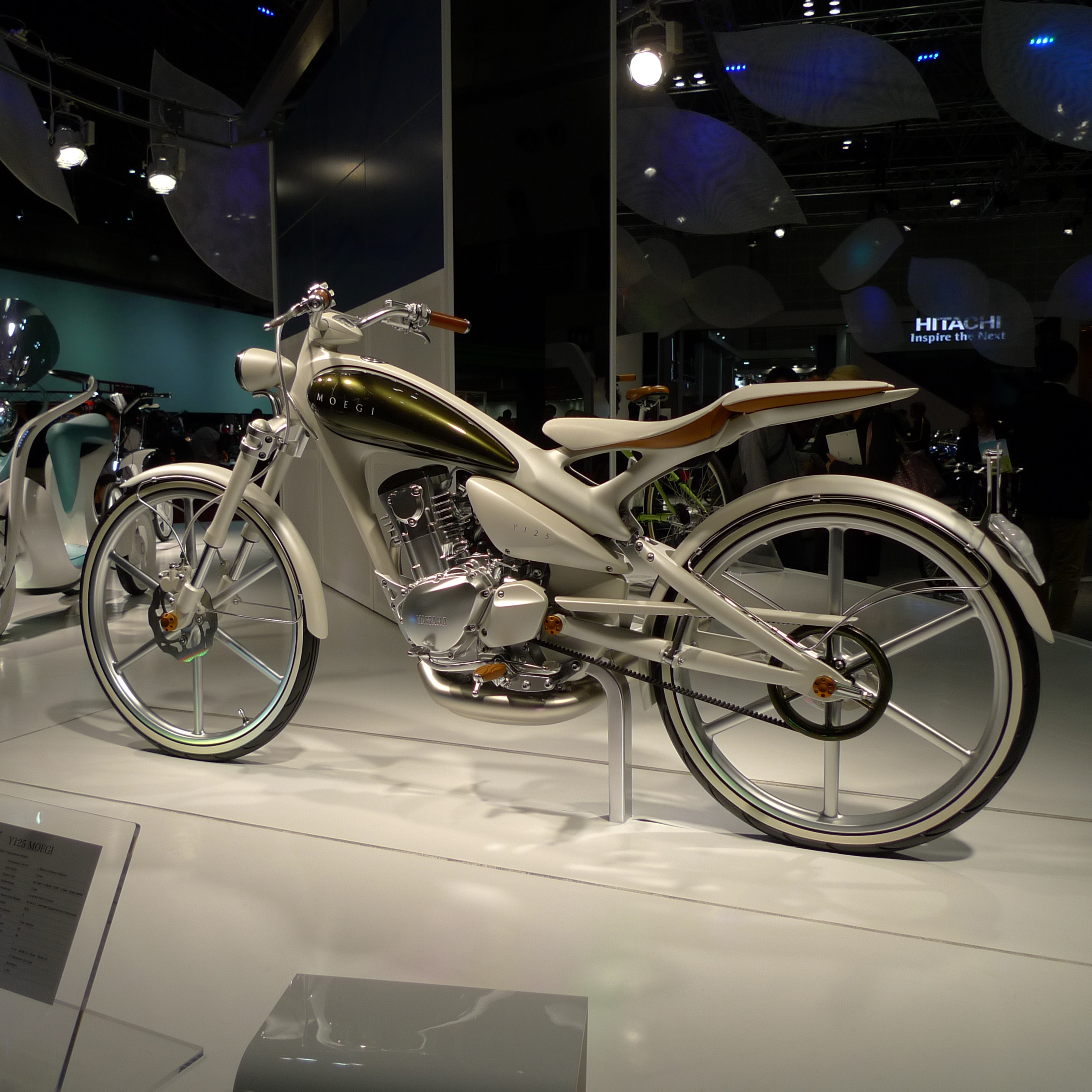 ヤマハ・Y125もえぎ 東京モーターショー2011にて撮影